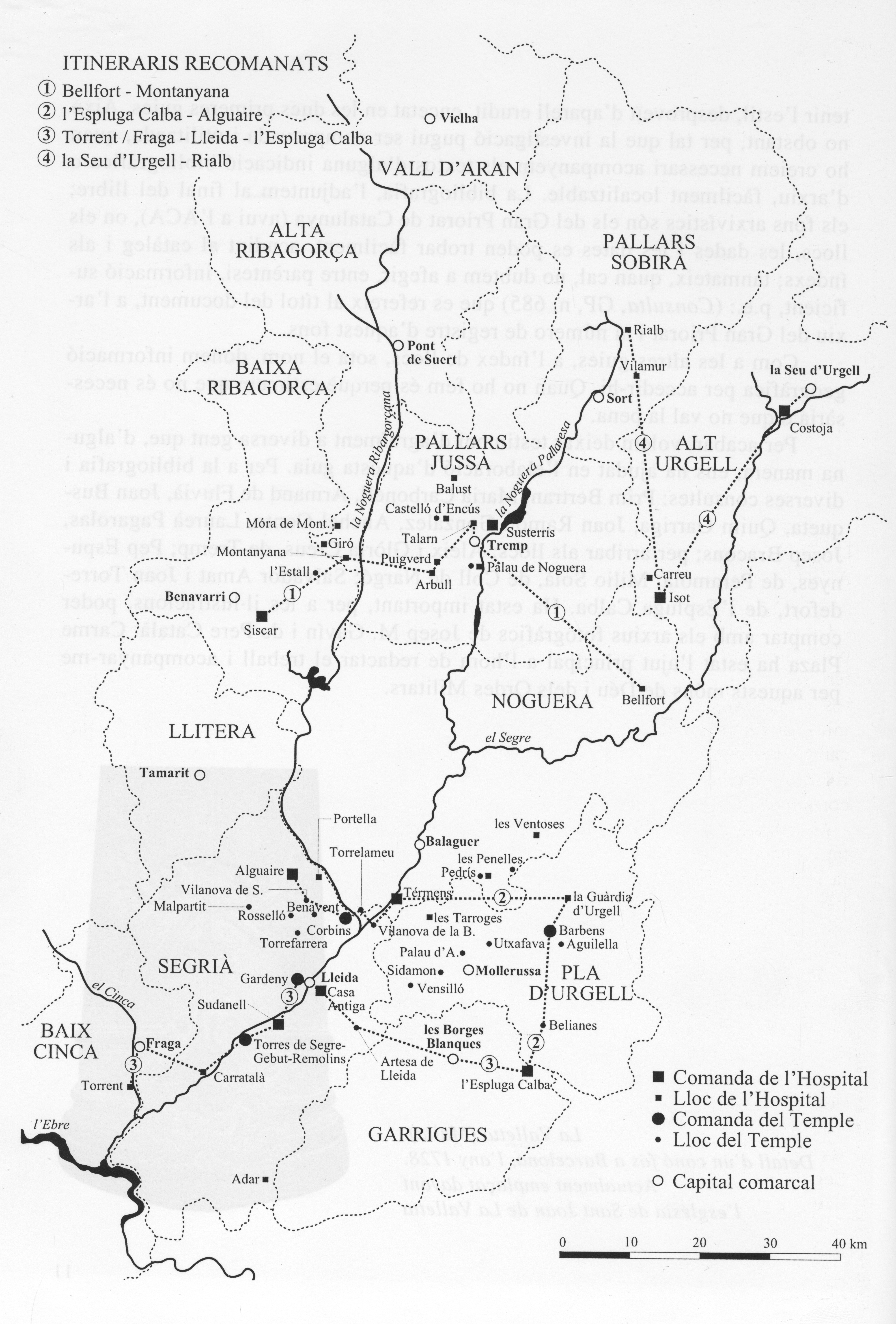 Mapa amb les comandes del Temple i de l'Hospital (i les seves possessions) de les Terres de Ponent. (font: Fuguet, 2000).